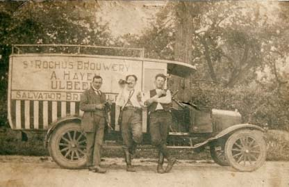 Brouwerij Hayen - Ulbeek - Wellen - Limburg - België